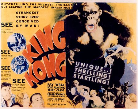 Elokuvan mainosjuliste.